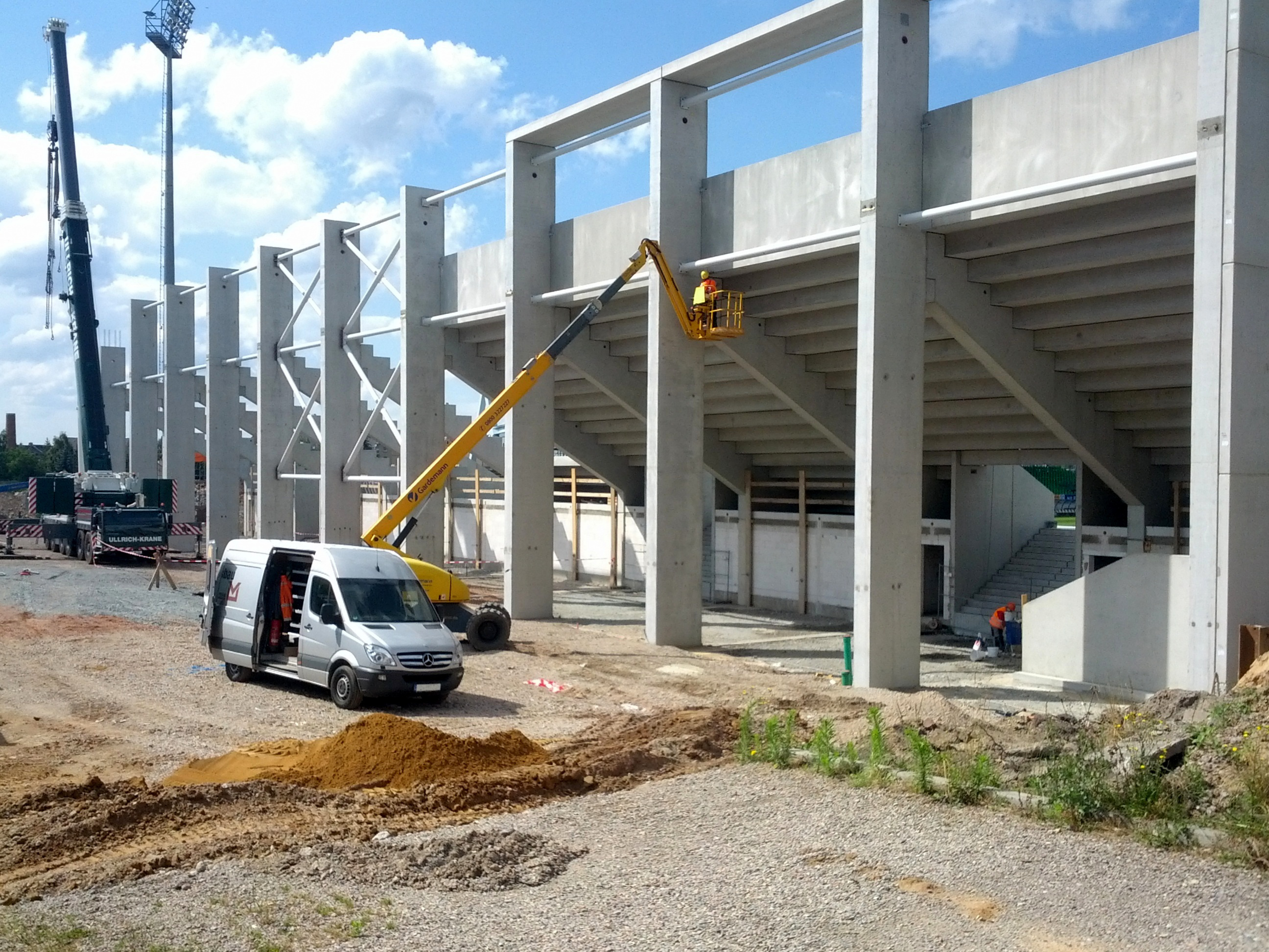 Neubau der Südtribüne am Stadion an der Gellertstraße. Rückseite